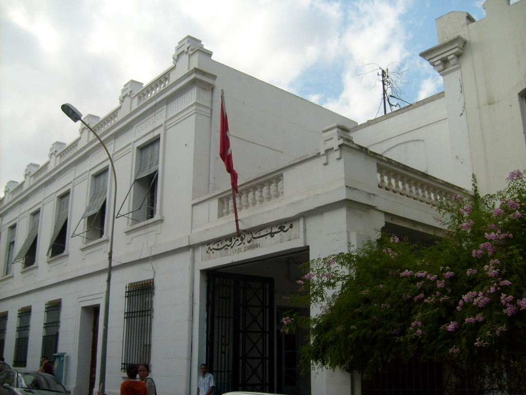 Façade de l'ancien Lycée Carnot de Tunis, actuel Lycée pilote Bourguiba